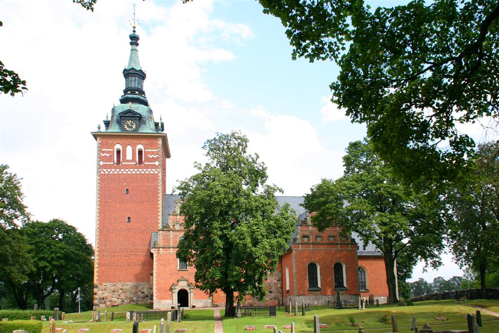 Foto: Tor Svensson